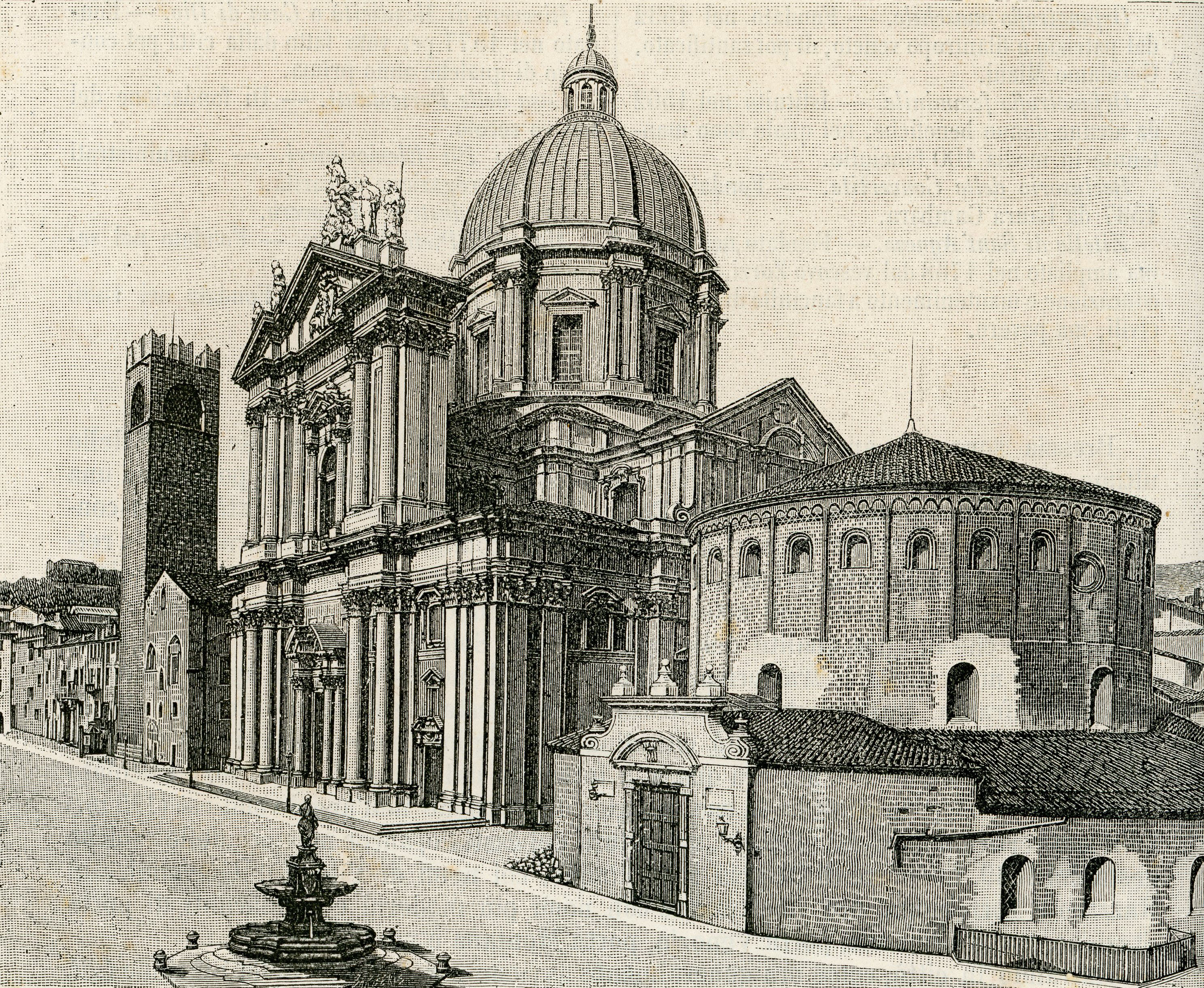 Brescia: duomo nuovo o cattedrale e duomo vecchio, (xilografia di Barberis).